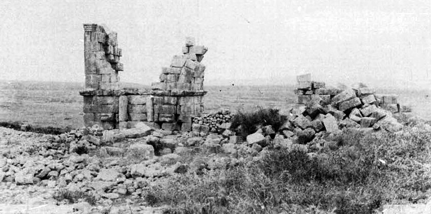 Arc de triomphe de Volubilis. Le fond formé par la suite des hauteurs du Djebel Outita